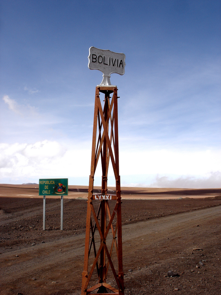 Camino de vuelta a Uyuni, totalmente aburridos, paisaje: desierto.